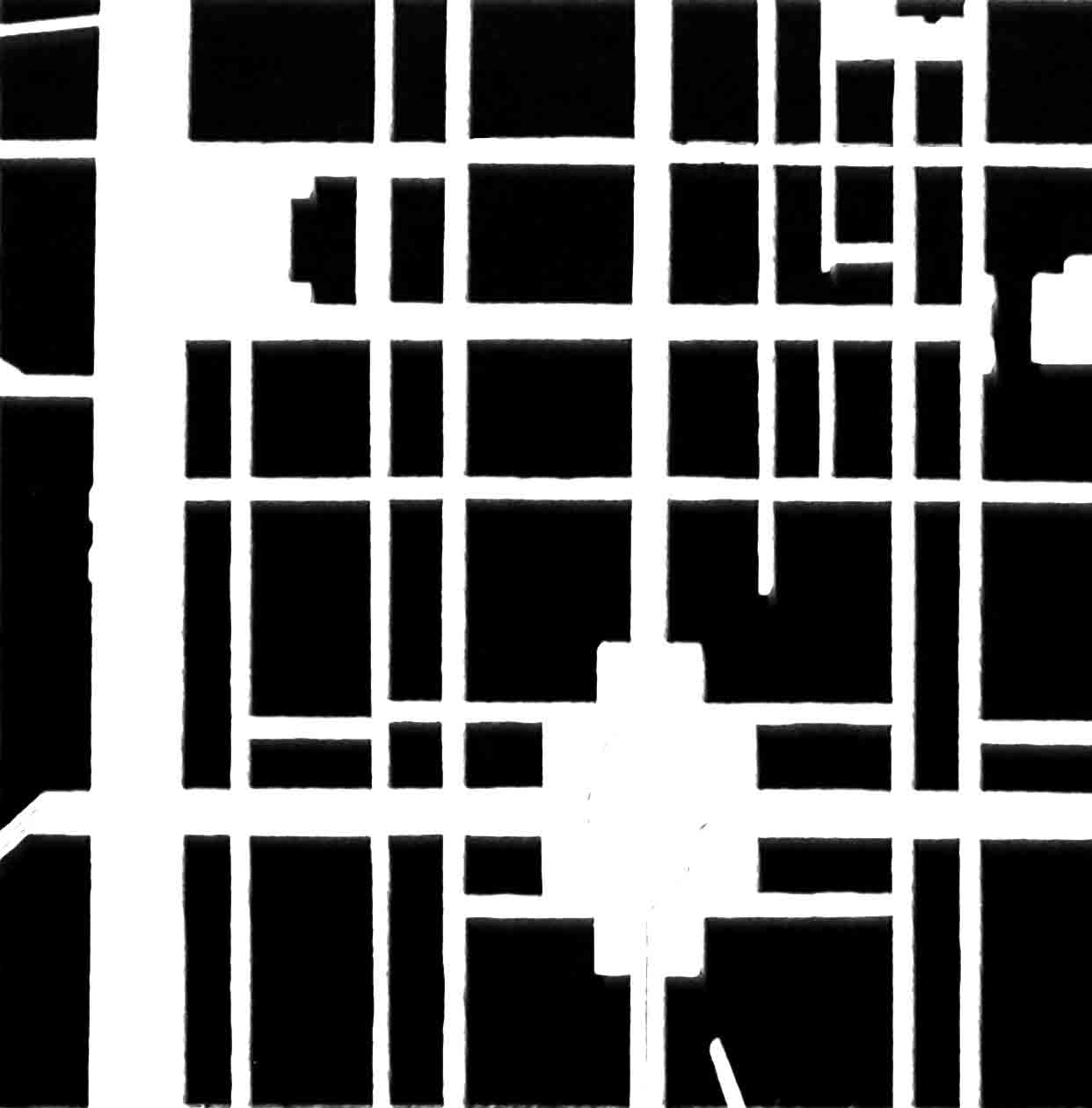 Das Bild zeigt einen Ausschnitt der Krefelder Innenstadt, die nach dem Plan von A. v. Vagedes aus dem Jahr 1819 ältere Teile und die vorgeschlagene Stadterweiterung in einem Plan zusammenfasst, der einerseits einem klassizistisch strengen Schema folgt, andererseits einen barock anmutenden neuen Platz enthält.